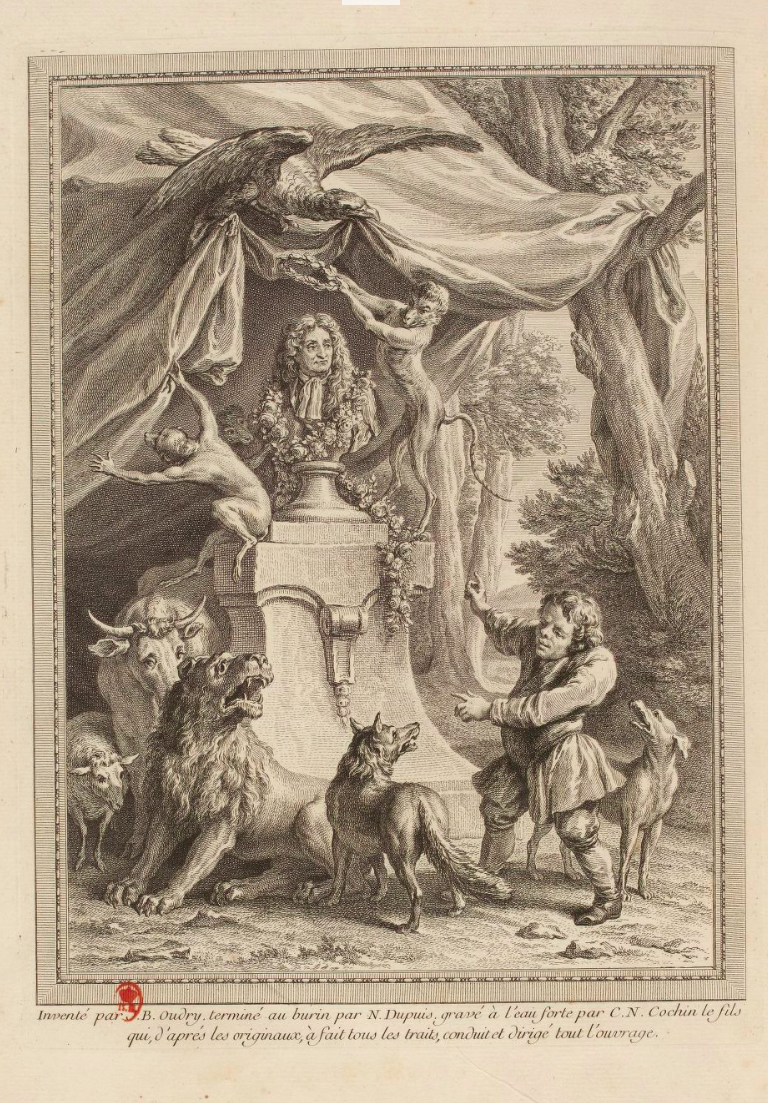 Gravure réalisée par Charles-Nicolas Cochin fils d'après un dessin de Jean-Baptiste Oudry représentant un buste de Jean de La Fontaine entouré d'animaux et montré du doigt par un petit homme. Cette gravure est parue dans l'édition complète des fables de La Fontaine, en tête des quatre tomes chez l'éditeur Desaint, Saillant et Durand, rue saint Jean de Beauvais à Paris, imprimée par Charles-Antoine Jombert entre 1755 et 1759.